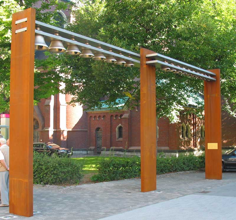 Neheimer Glockenspiel, Schenkung der Schützenbruderschaft St. Johannes Bapt. Neheim 1607 zum 400jährigen Jubiläum